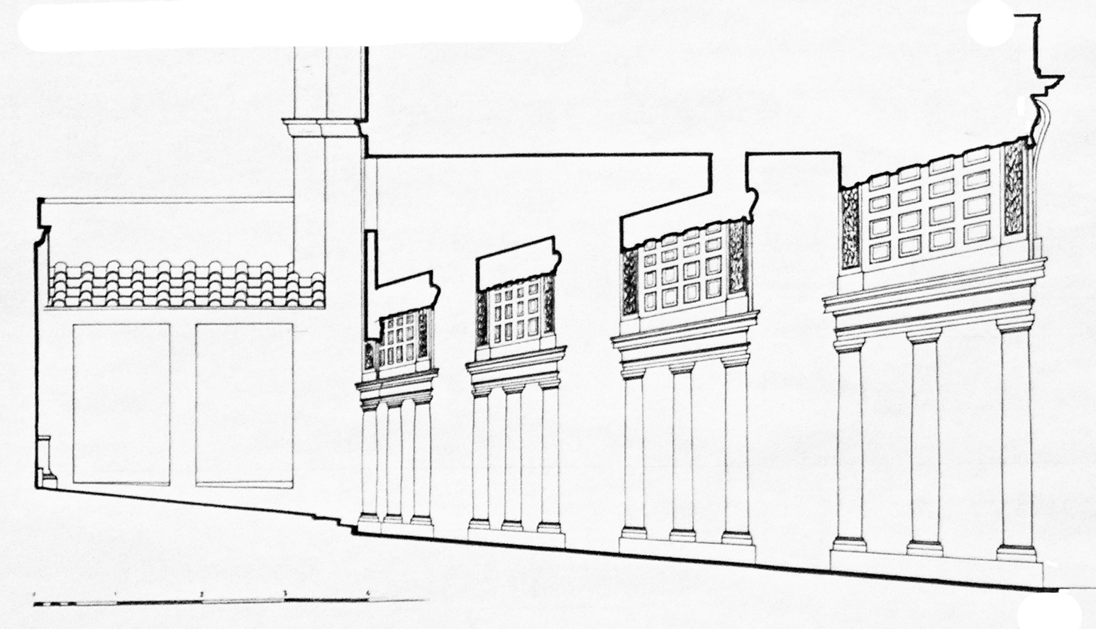 Coupe de la galerie du Palazzo Spada à Rome